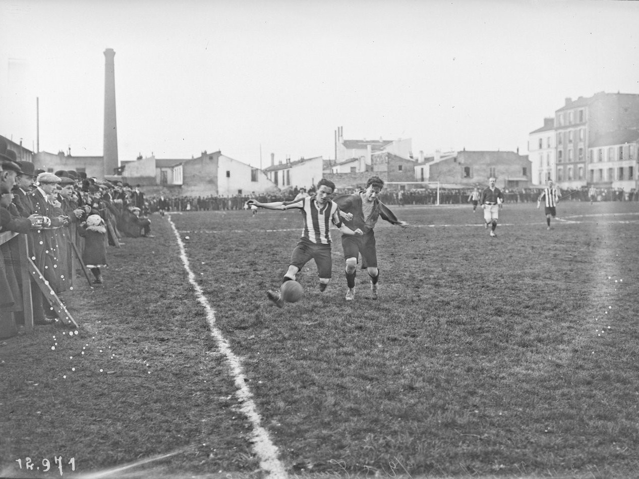 Match de football à Levallois le 19 mars 1911 entre l'Union sportive de Clichy et l'Union sportive tourquennoise. Victoire 3-0 de l'US Clichy (